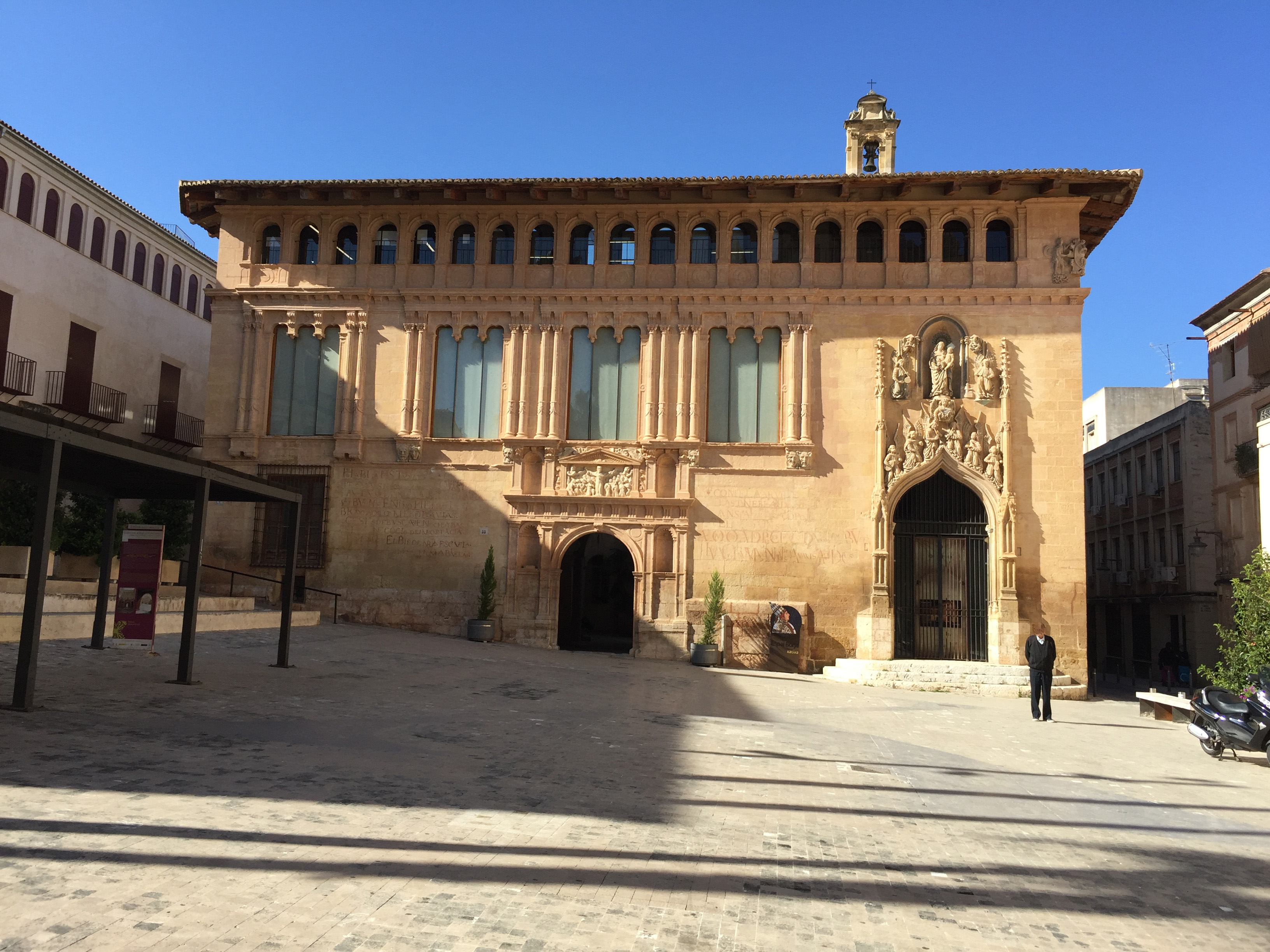 Façade de style Renaissance.